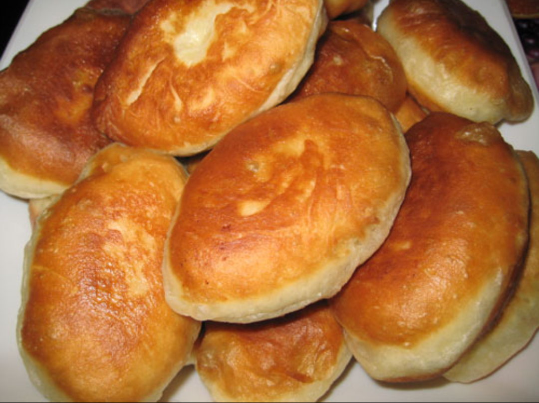 פירושקי